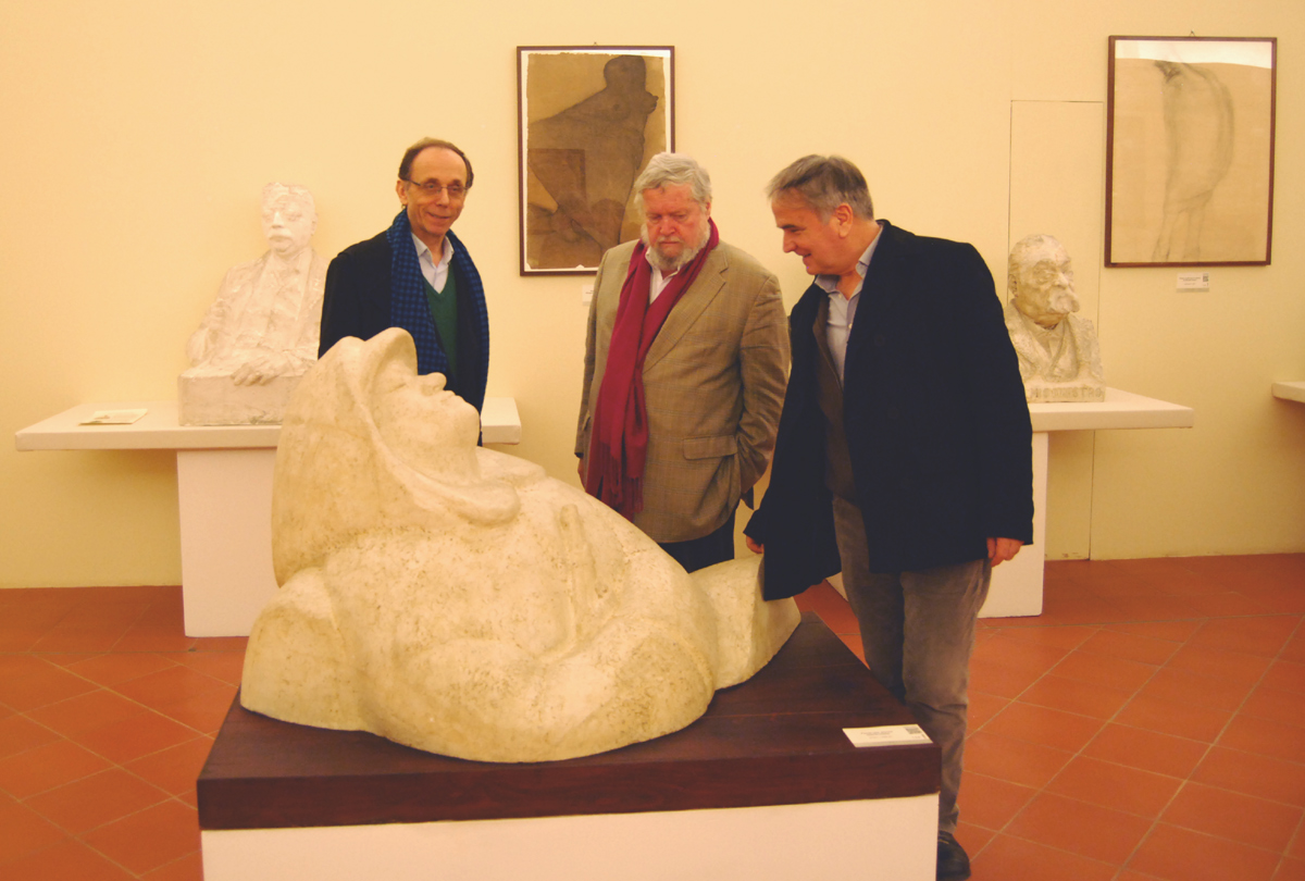 In prima file il gesso del Fante che dorme, opera di Domenico Rambelli 1924-26. Sullo sfondo altre opere di Domenico Rambelli. Tra i visitatori il primo a sinistra è Claudio Casadio, direttore della Pinacoteca Comunale e curatore della mostra, al centro il critico d'arte Peter Weiermair e a destra lo scultore Aldo Rontini.